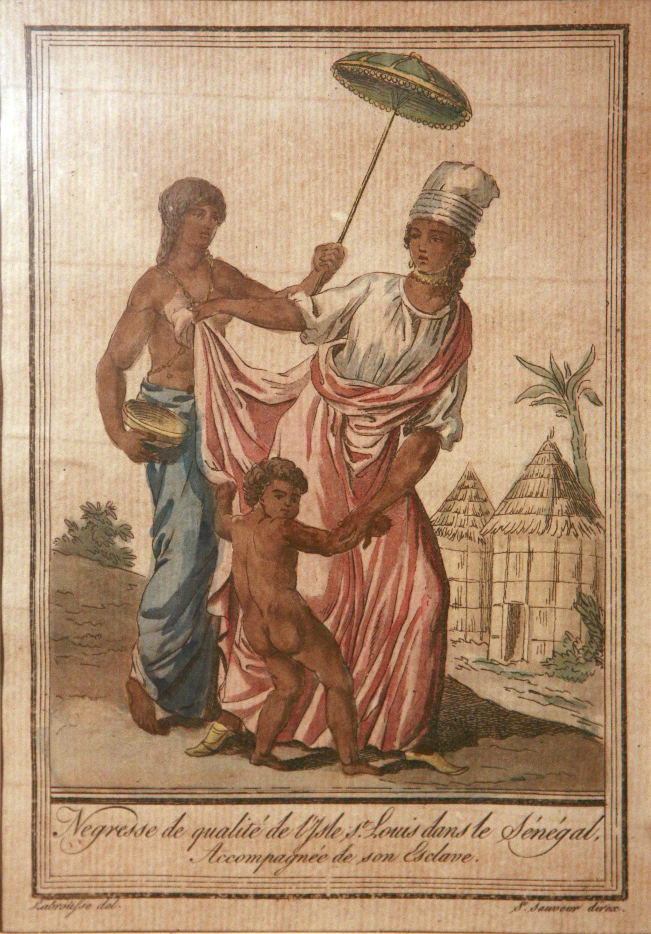 Negress of quality from the Island of Saint Louis in Senegal, accompanied by her slave. Illustration from Costumes civils actuels de tous les peuples connus, Paris, 1788, by Jacques Grasset de Saint-Sauveur (1757-1810). Aquatint. On display at the Musée de la Compagnie des Indes in Port-Louis